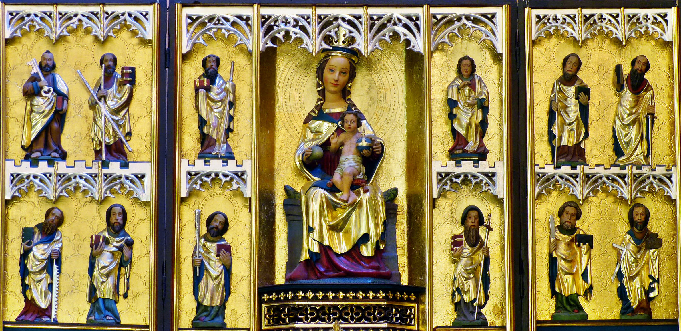 Maryja z Jezusem, dookola apostolowie, ok. 1420. W bazylice w Dobrym Mieście